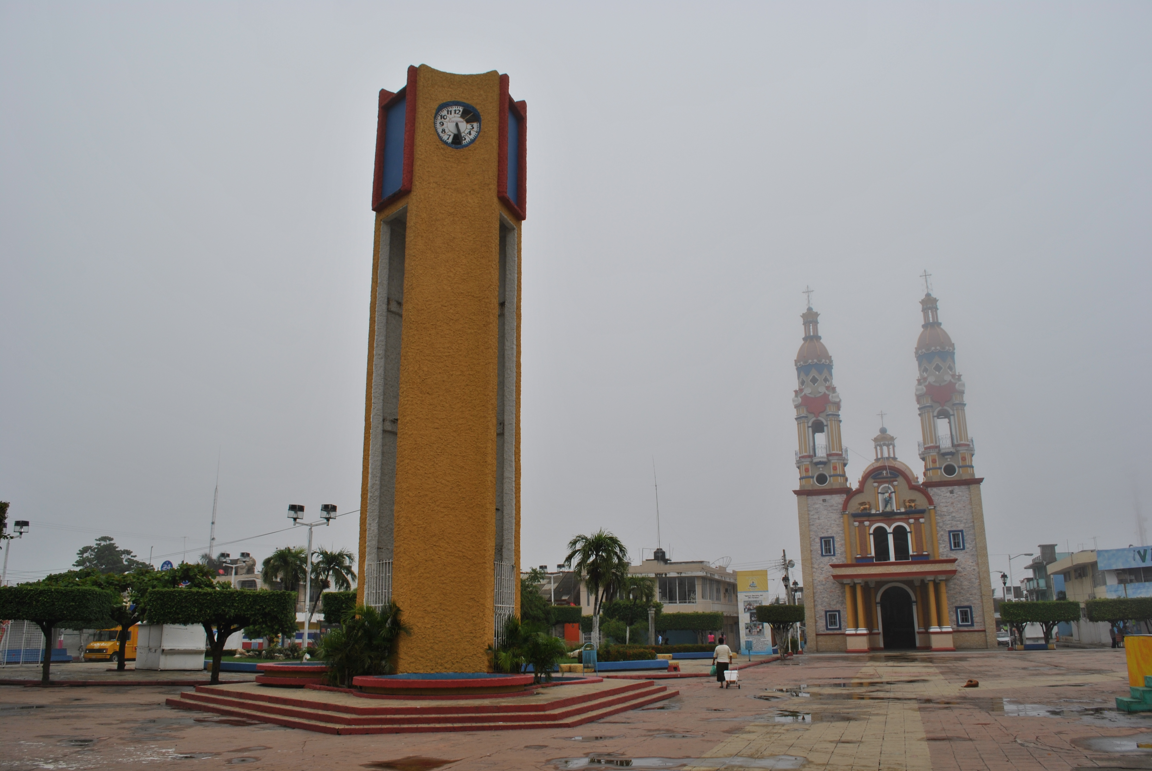 Plaza principal de Paraíso Tabasco.